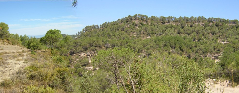 Els Salarots (Monistrol de Calders, Moianès)